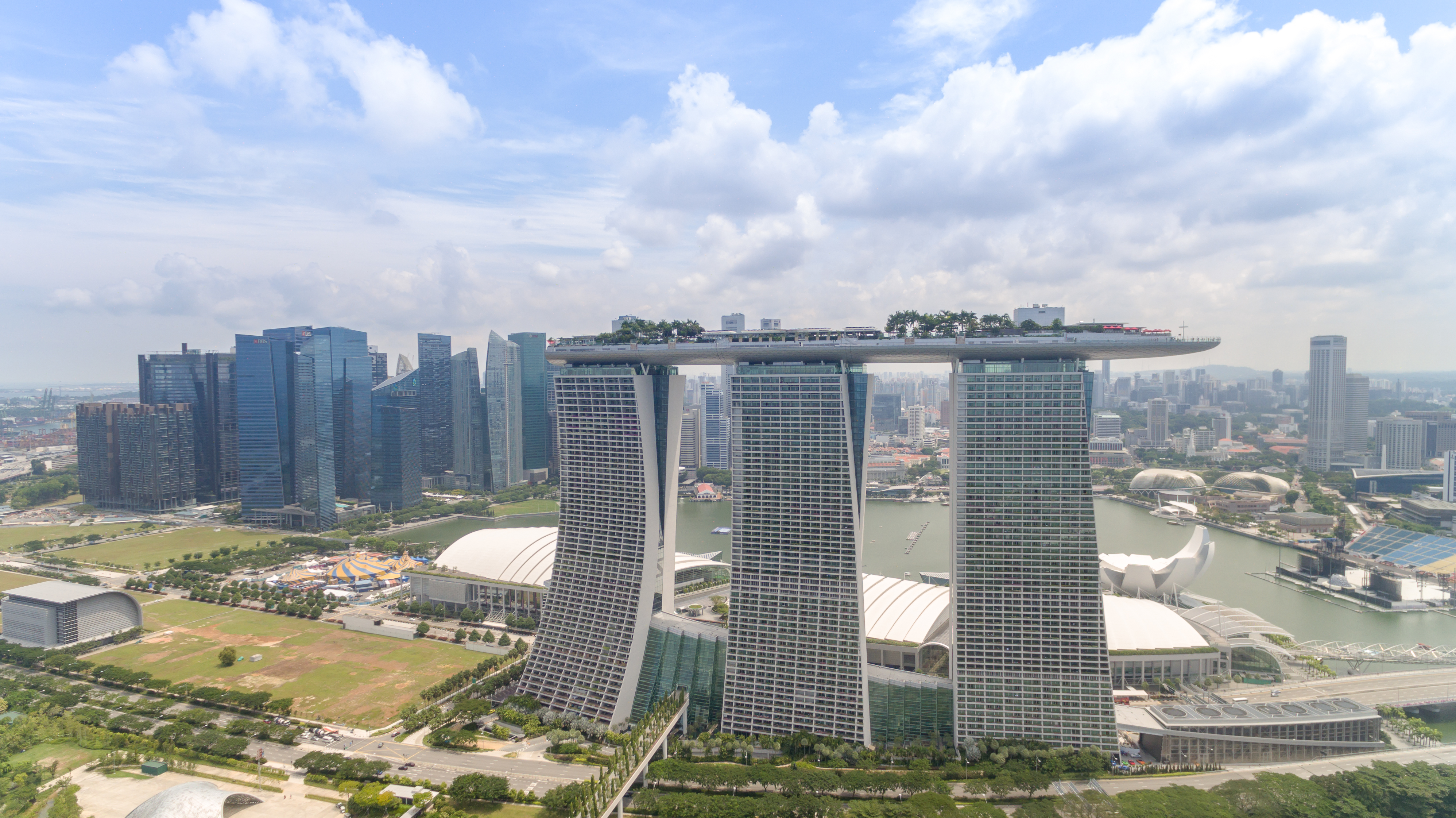 Aerial of Marina Bay Singapore Singapur Singapore Luftbild aerial